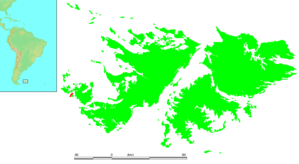 Falkland Islands - Staats Island.PNG